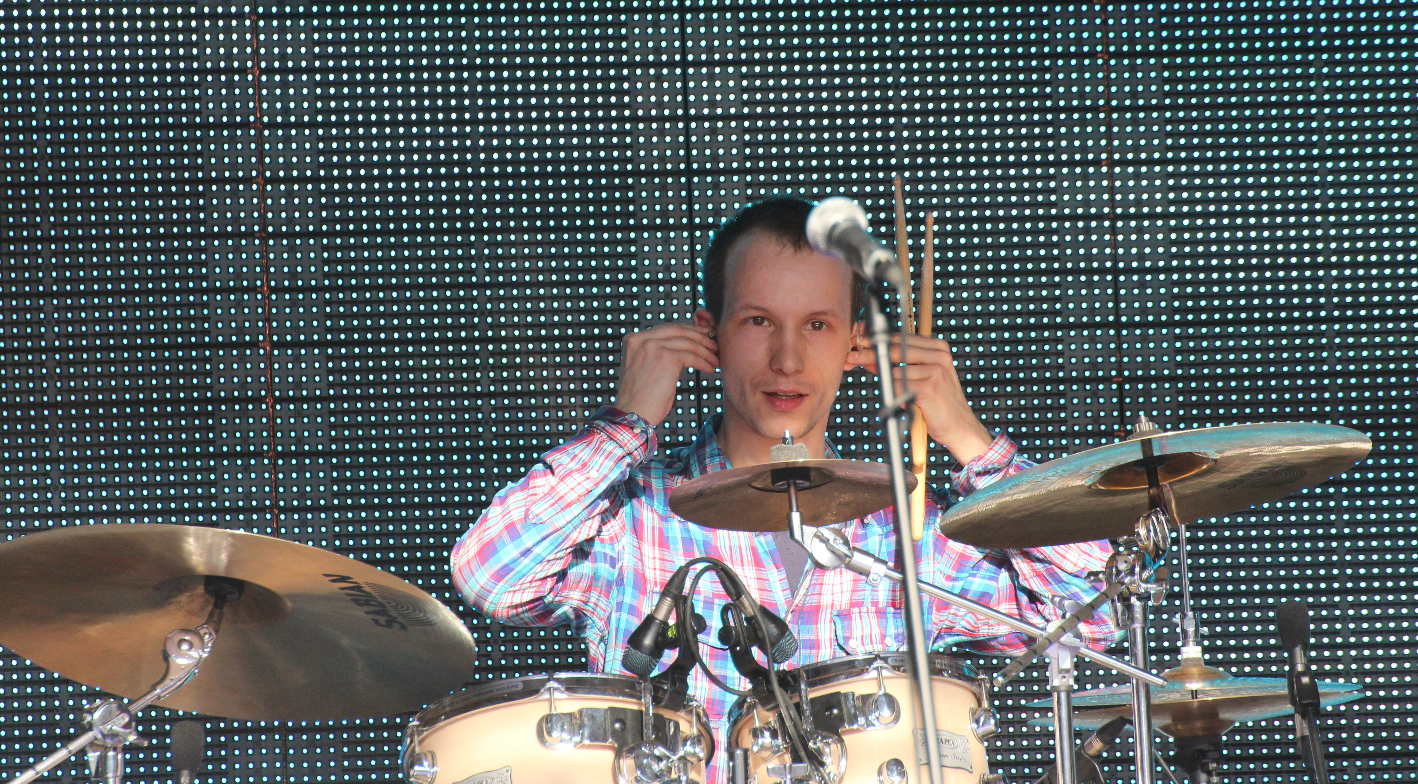 Dmitri Nikolajevski esinemas Liis Lemsalu ansamblis Tallinnas Raekoja platsil.